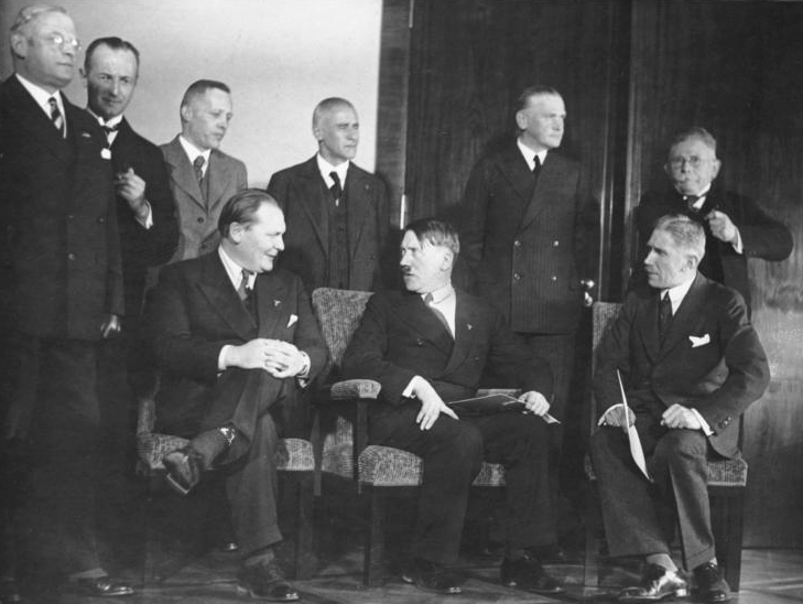 Zentralbild Die deutschen Faschisten bilden nach der Machtergreifung am 30.1.1933 ihr erstes Kabinett unter Adolf Hitler. UBz: vlnr, sitzend: Hermann Göring, Reichskommissar für Luftfahrt und das preussische Innenministerium, Adolf Hitler, Reichskanzler, Franz von Papen, Vizekanzler stehend: Franz Seldte, Arbeitsminister, Dr. Dr. Günther Gereke, Lutz Graf Schwerin von Krosigk, Reichsfinanzminister, Wilhelm Frick, Reichsinnenminister, Werner von Blomberg, Reichswehrminister, Alfred Hugenberg, Wirtschafts- und Ernährungsminister 3633-33